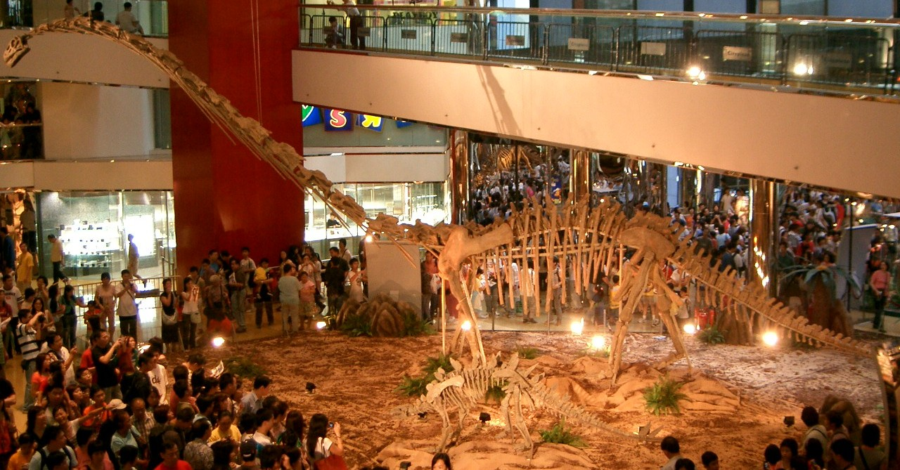 Omeisaurus tianfuensis and Tuojiangosaurus on display in Hong Kong.